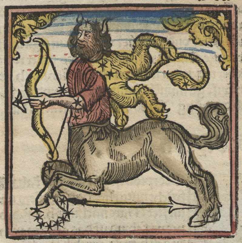 Original image description from the Deutsche Fotothek Astrologie & Sternzeichen & Kalender